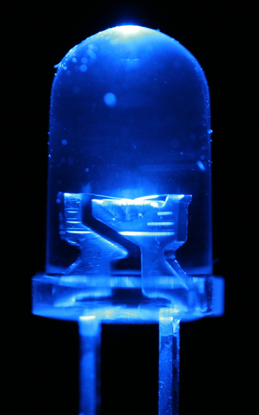 LED macro, blue.